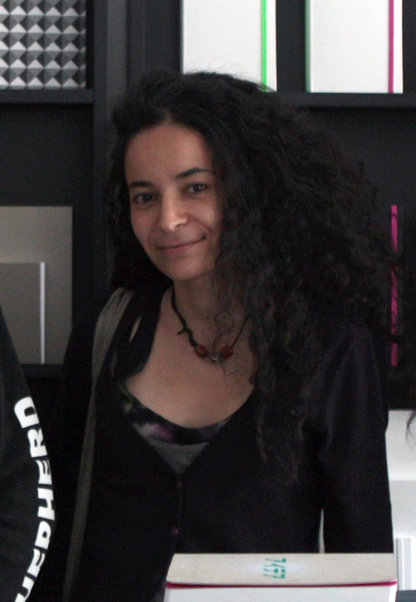 Lamya Essemlali en 2012.